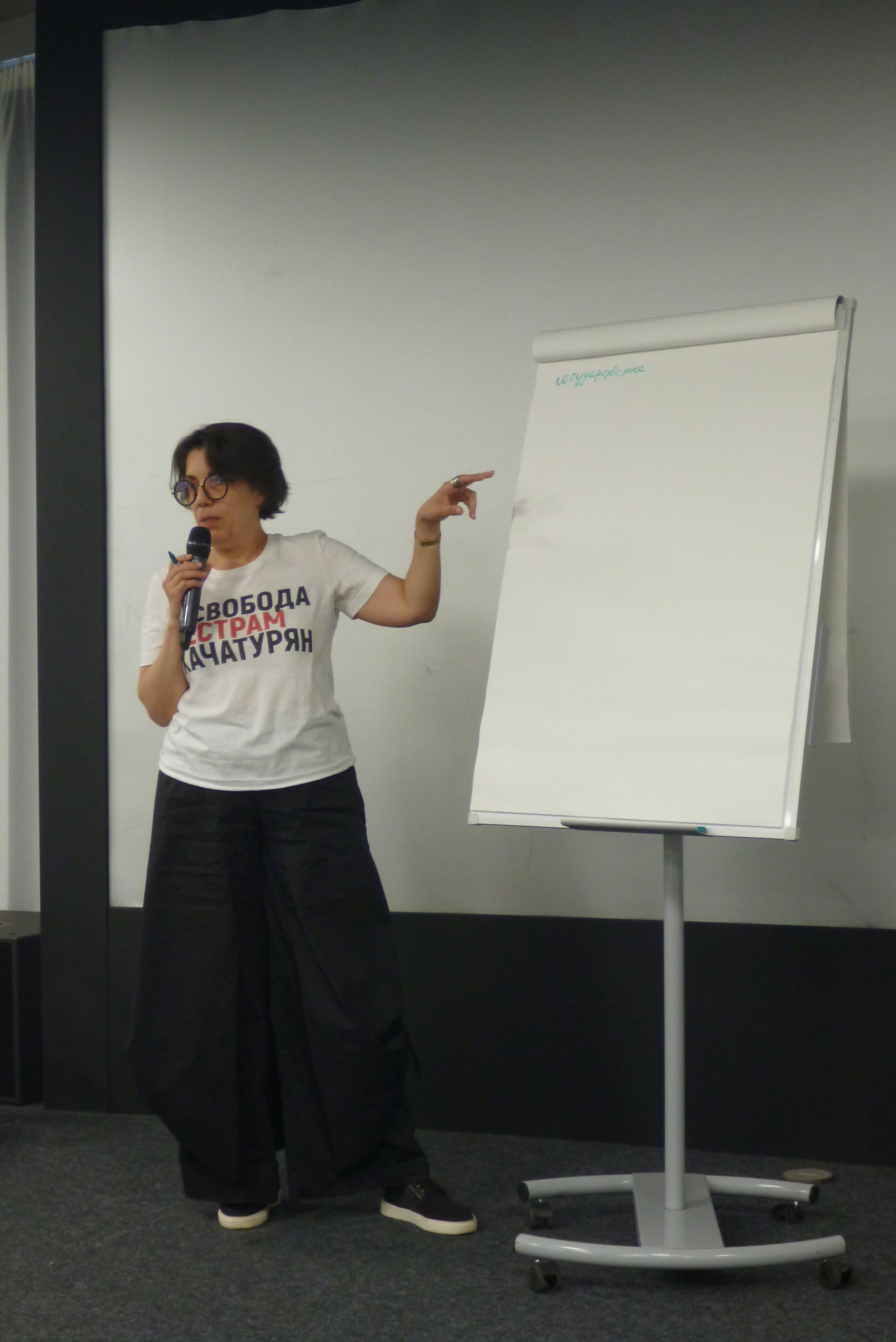 Зара Арутюнян в Ельцин-центре 21 июня 2019 года